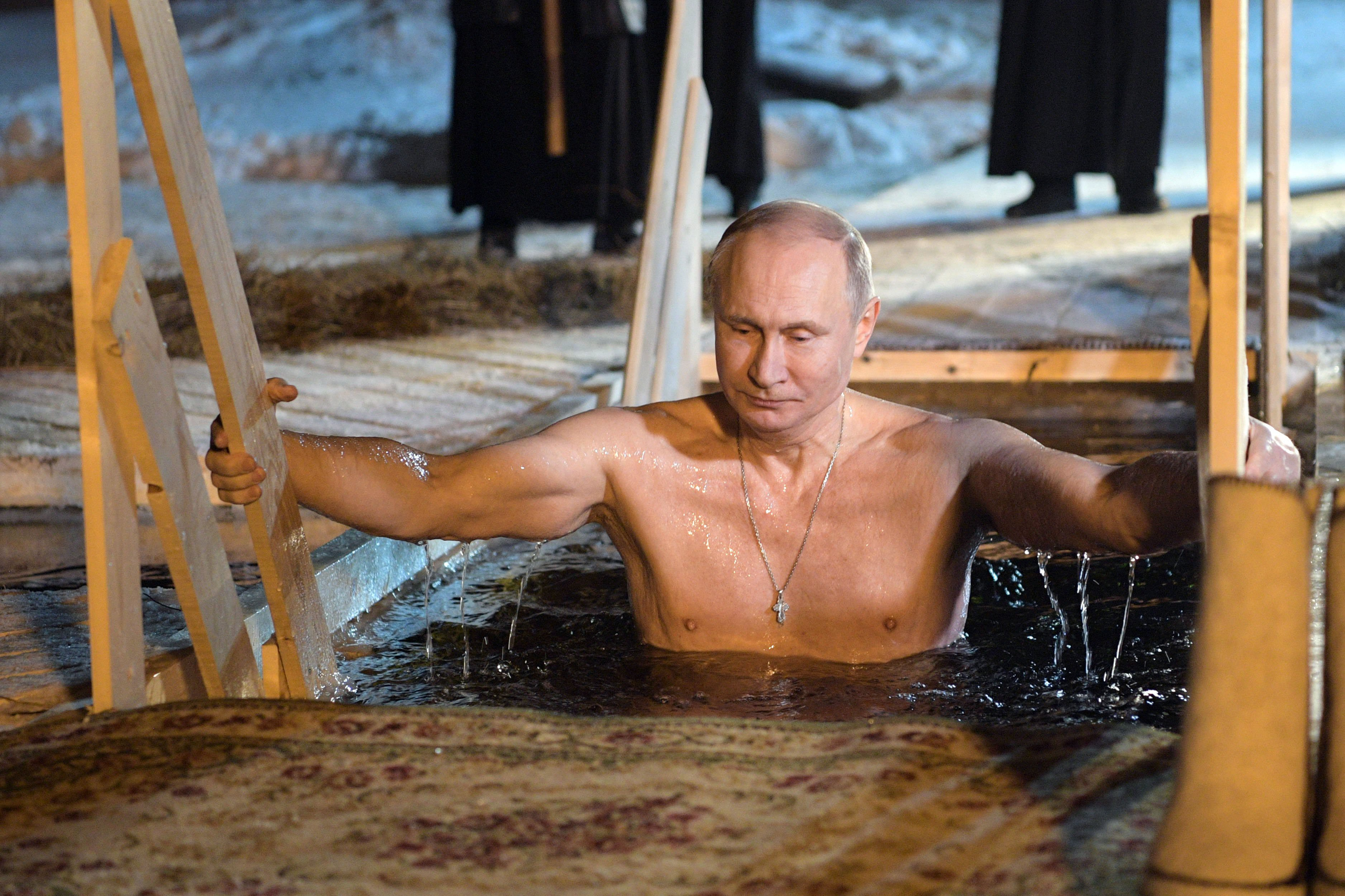 Владимир Путин поучаствовал в крещенских купаниях на озере Селигер.